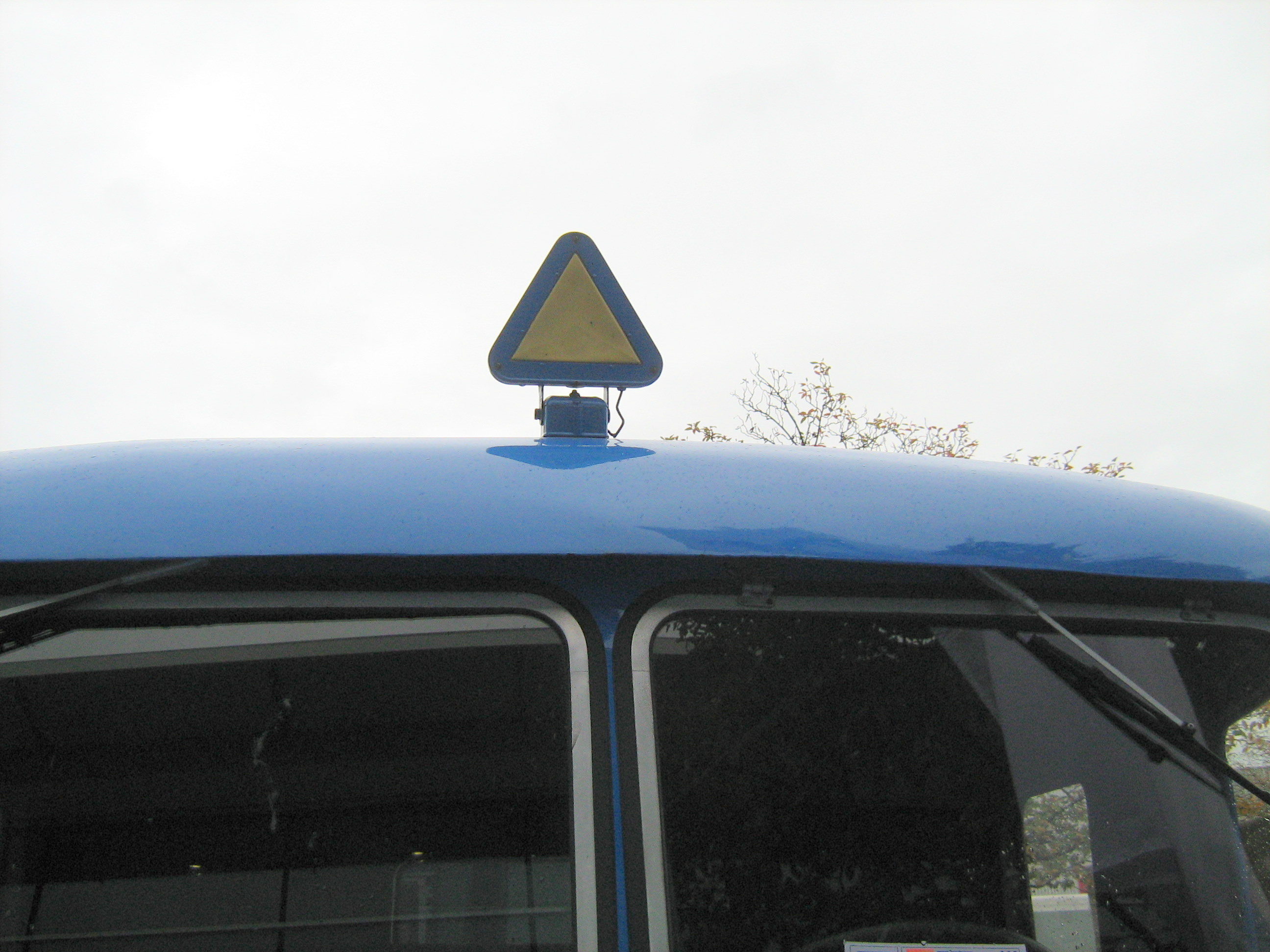 altes Anhängerdreieck auf dem Fahrerhaus Dach